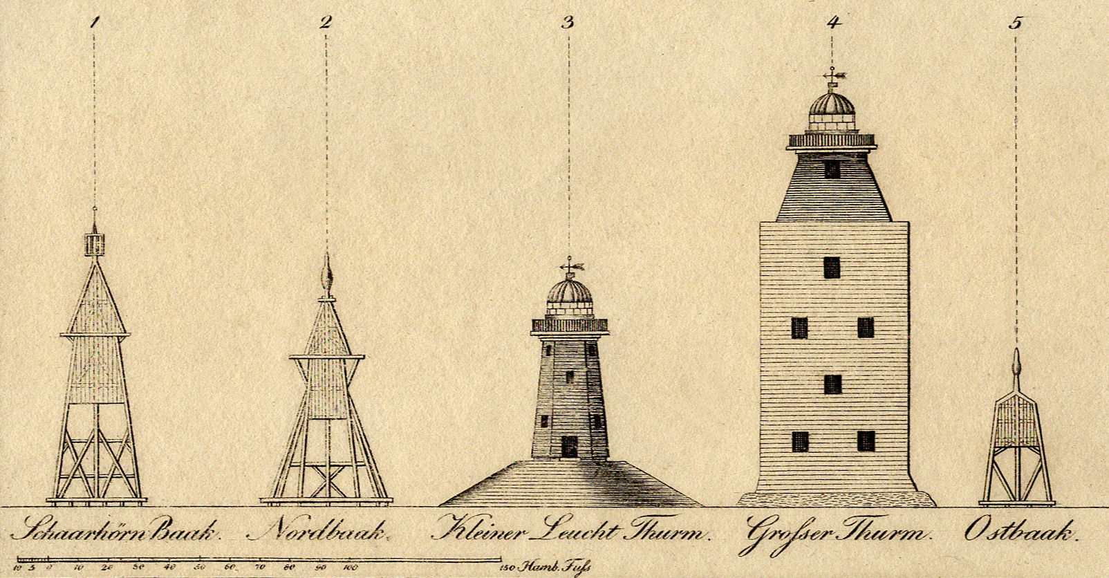 Abbildung der Leutchtürme und Baken Neuwerks. Ausschnnitt der Legende auf der Karte der Deutschen Bucht von E.W. Schuback (1831), siehe auch [1]